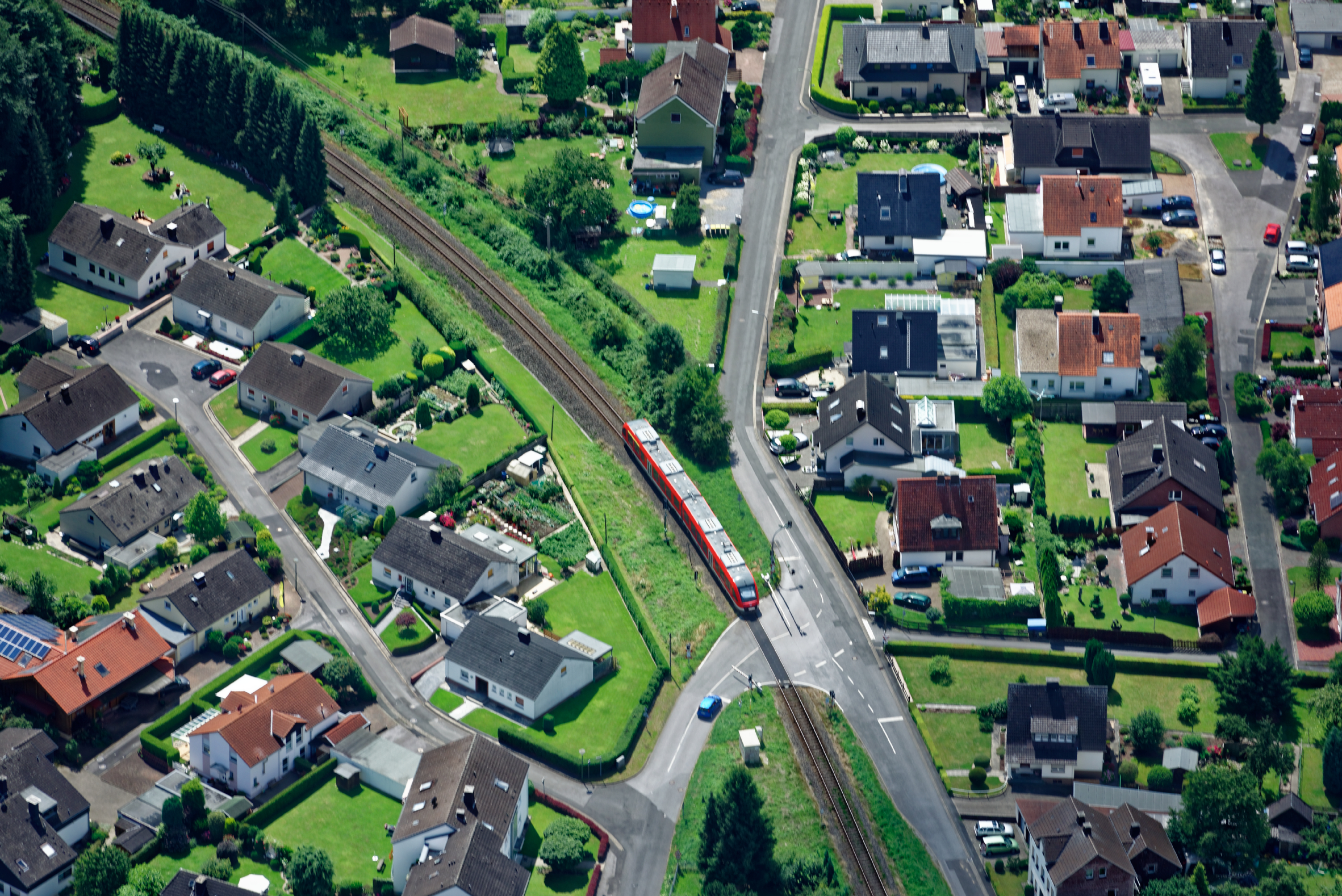 Fotoflug Sauerland West. Ansicht im Fröndenberger Ortsteil Ardey; Diesel-Triebzug der Baureihe 640 der Regionabahn RB54 „Hönnetal-Bahn“ auf der Bahnstrecke Hönnetalbahn.